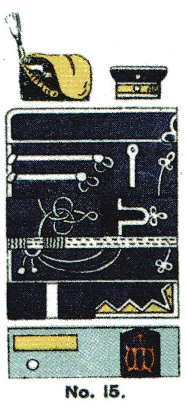 Uniform des Husaren-Regiments Nr. 15 um 1912